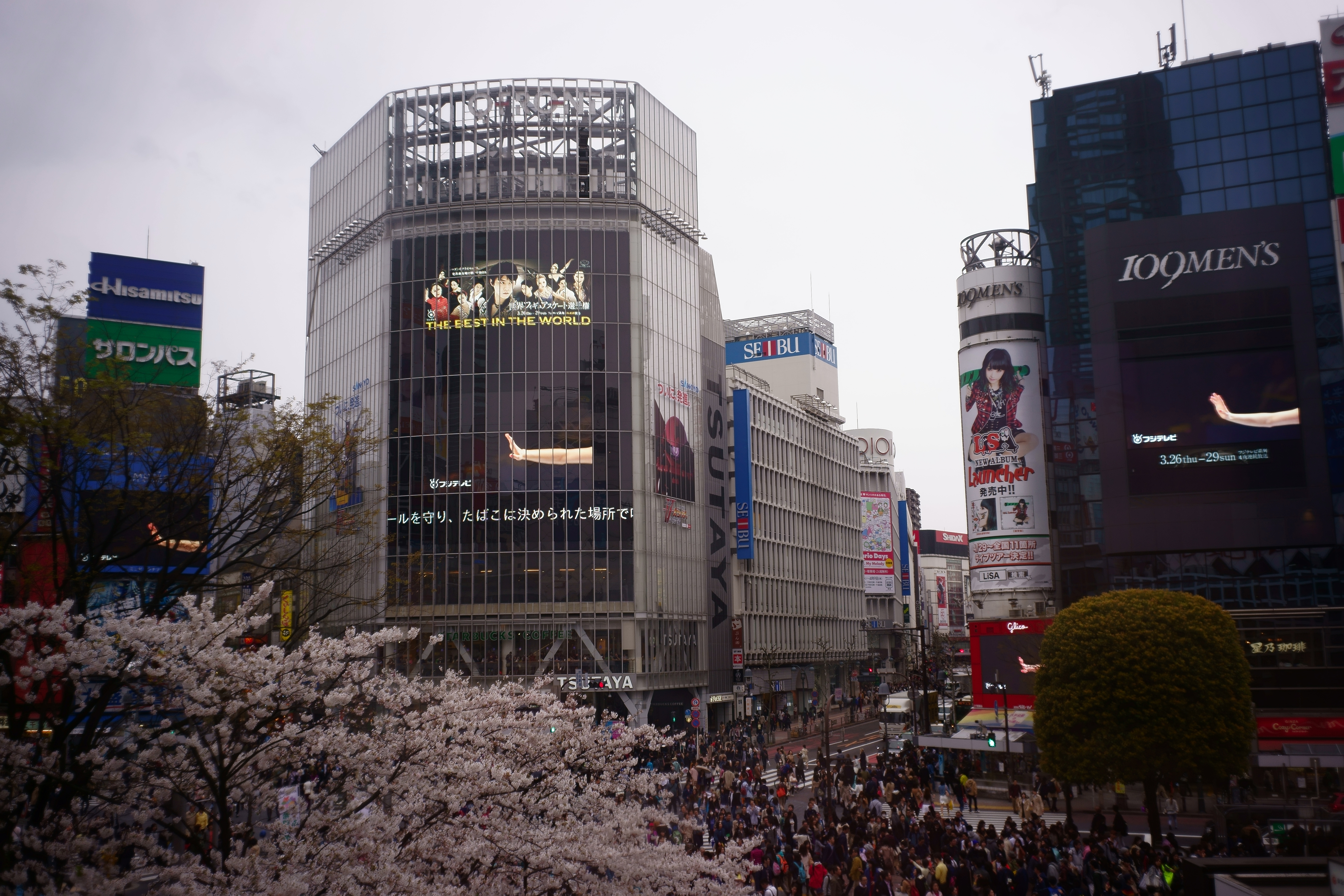 渋谷スクランブル交差点